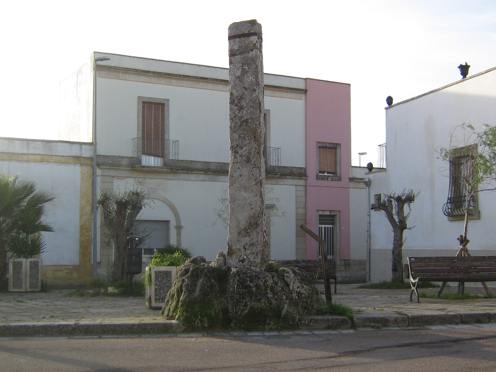 Giurdignano Menhir San Vincenzo